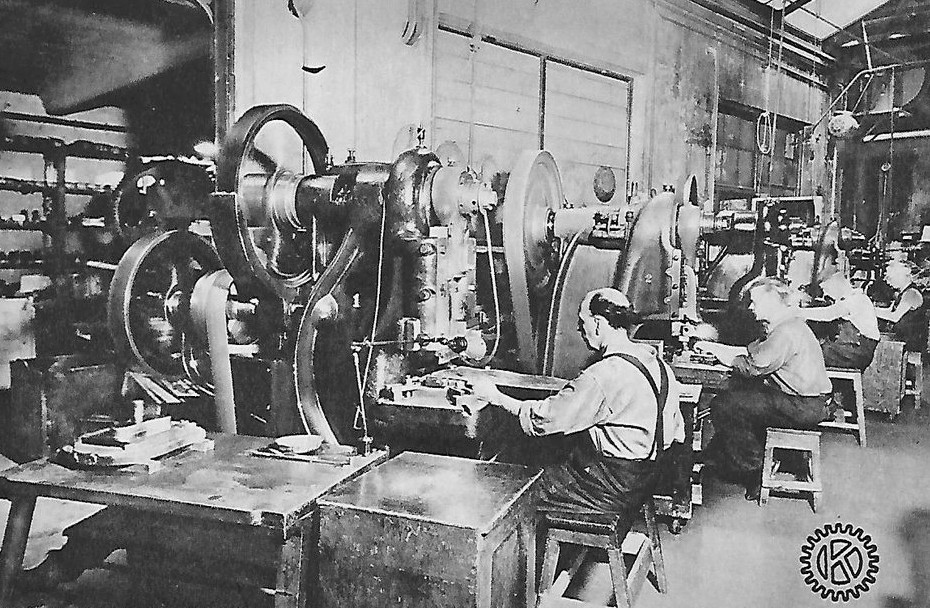 Hallbergs Guldsmeds fabrik vid Bergsgatan